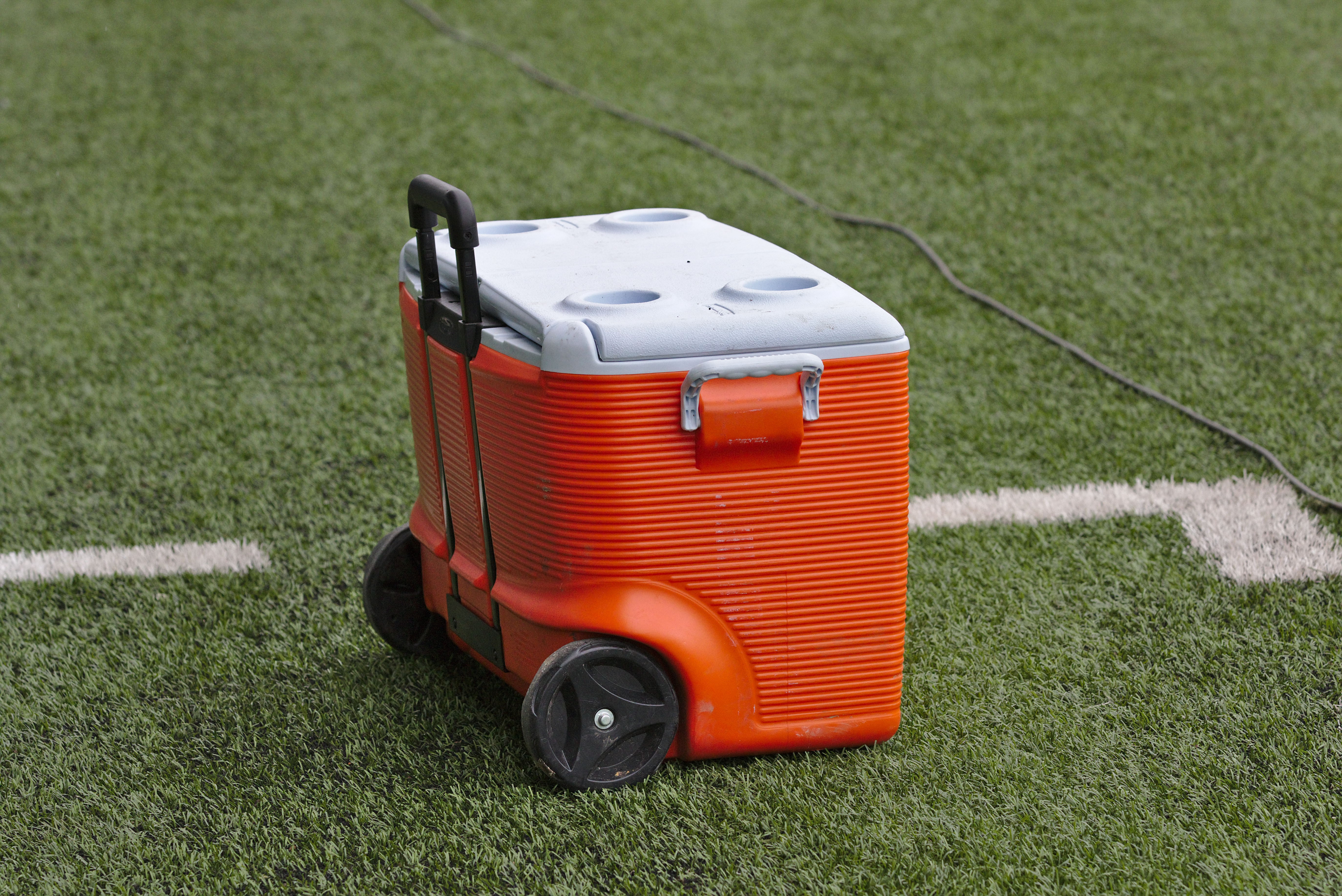 USO - CAB - 20150328 - Glacière